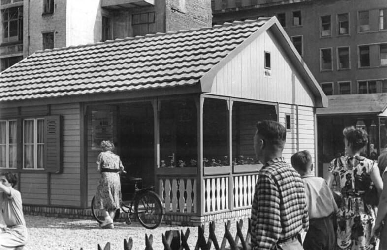 VEB Holzbau Leipzig, Ausstellung von Gartenlauben Zentralbild Ra.-Ho. 11.8.1953 Lauben und Kleinhäuser aus genormten Fertigteilen. Nach einem Beschluss des Ministeriums für Leichindustrie wurde im VEB Holzbau Leipzig damit begonnen, Gartenlauben, Wohnlauben und Wochenendhäuser aus genormten Holzfertigteilen zu entwerfen. Betaut wurde damit der Architekt Sommer. 24 Lieferwerke sind jetzt an der Produktion von 14 Typen dieser Heimstätten beteiligt. Von der Einraumgartenlaube für 590,00 DM bis zum mit allem Komfort ausgestatteten Wochenendhaus für 5500,00 Dm wird allen Bedürfnissen Rechnung getragen. Die Häuschen sind so gebaut, dass sie sich der Eigentümer selbst zusammensetzen kann. Die grösseren Typen eigenen sich sogar als fester Wohnsitz. Im einer Ausstellung in der Rathausstrasse, die am 15.8.1953 eröffnet werden wird, können die Berliner einige Typen dieser Häuschen bewundern. Kolleg Löschmann von der DHZ Möbel-Holzwaren erklärt, dass jetzt schon ein reges Interesse bei den Berlinern festzustellen ist. Eine Wohnlaube zu 2350,00 DM die zu Schauzwecken aufgebaut wurde, ist bereits verkauft. UBz: Die Ausstellung in der Rathausstrasse in Berlin.